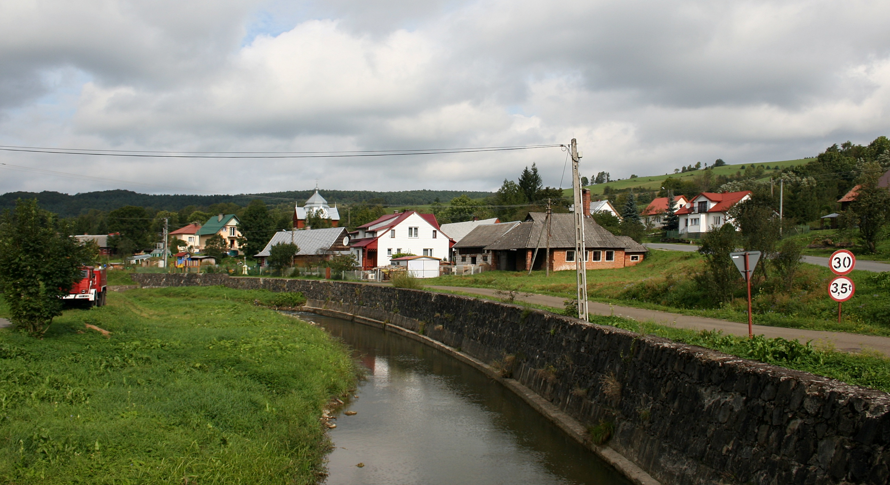 Rzeka Barbarka w Komańczy